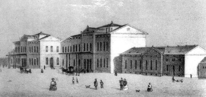 Der Berliner Bahnhof (Leipzig) um 1860